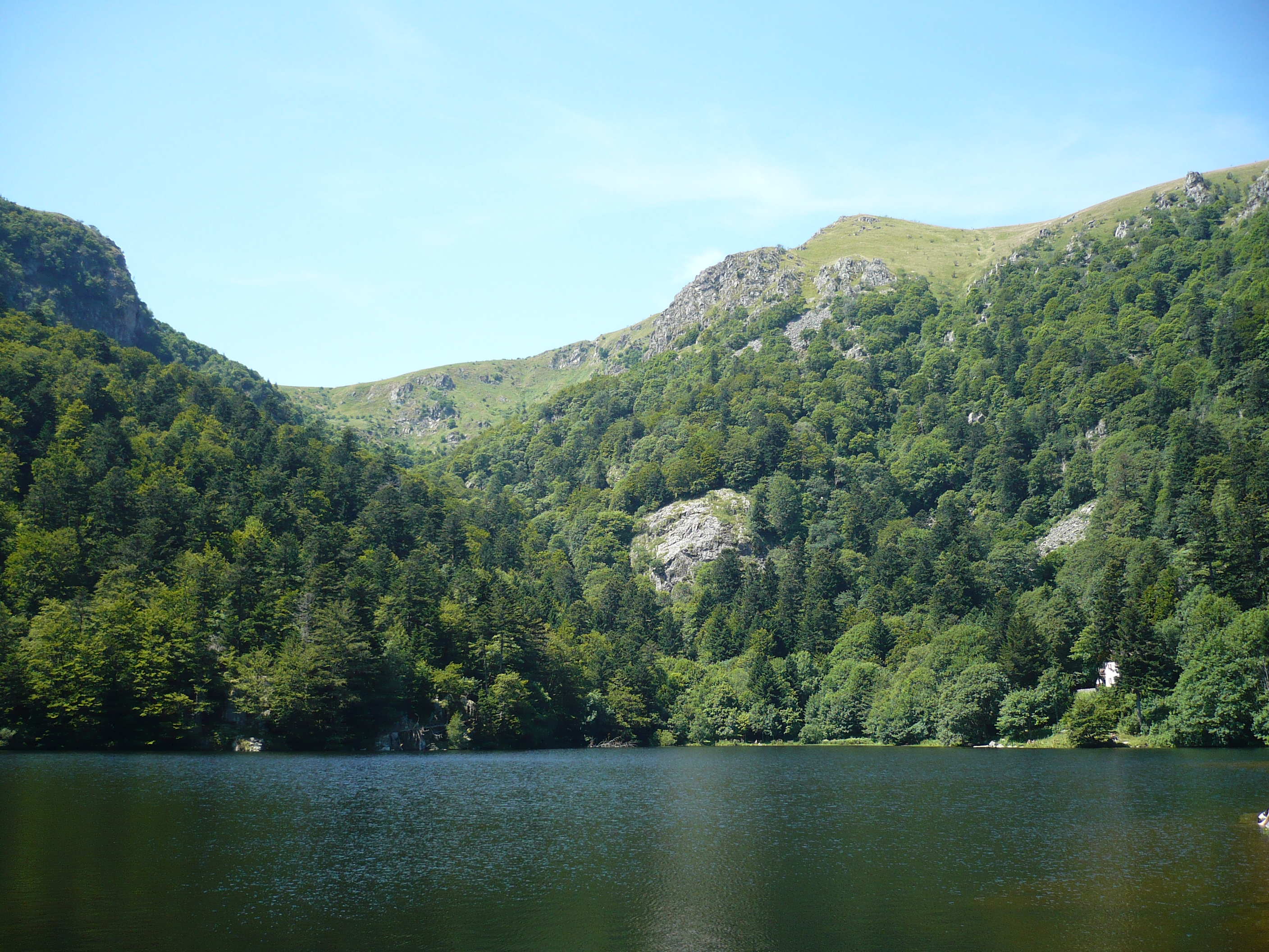 Lac de Schiessrothried unterhalb des Hohneck, Vogesen